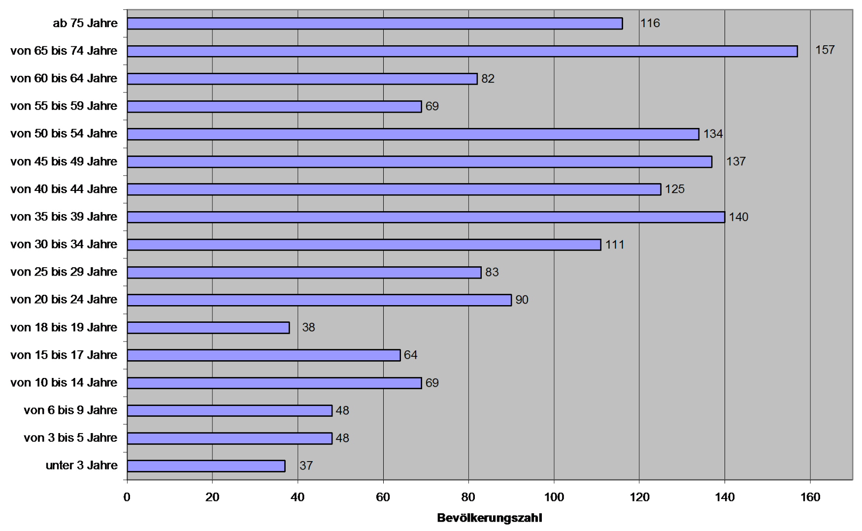 Altersstruktur in der Gemeinde Elstertrebnitz (bei Leipzig (Deutschland))